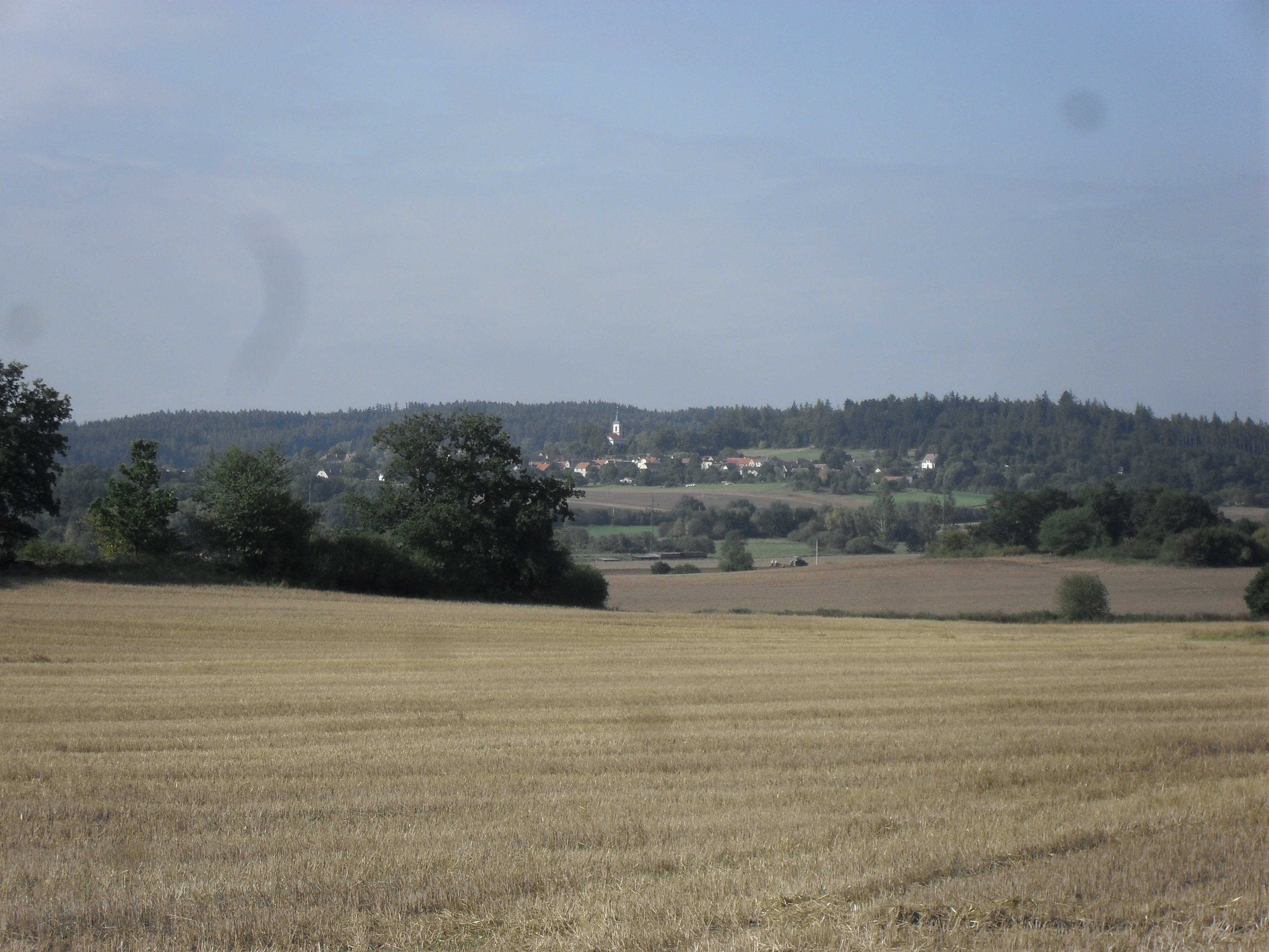 Fotografie pořízena v obci Maňovice.